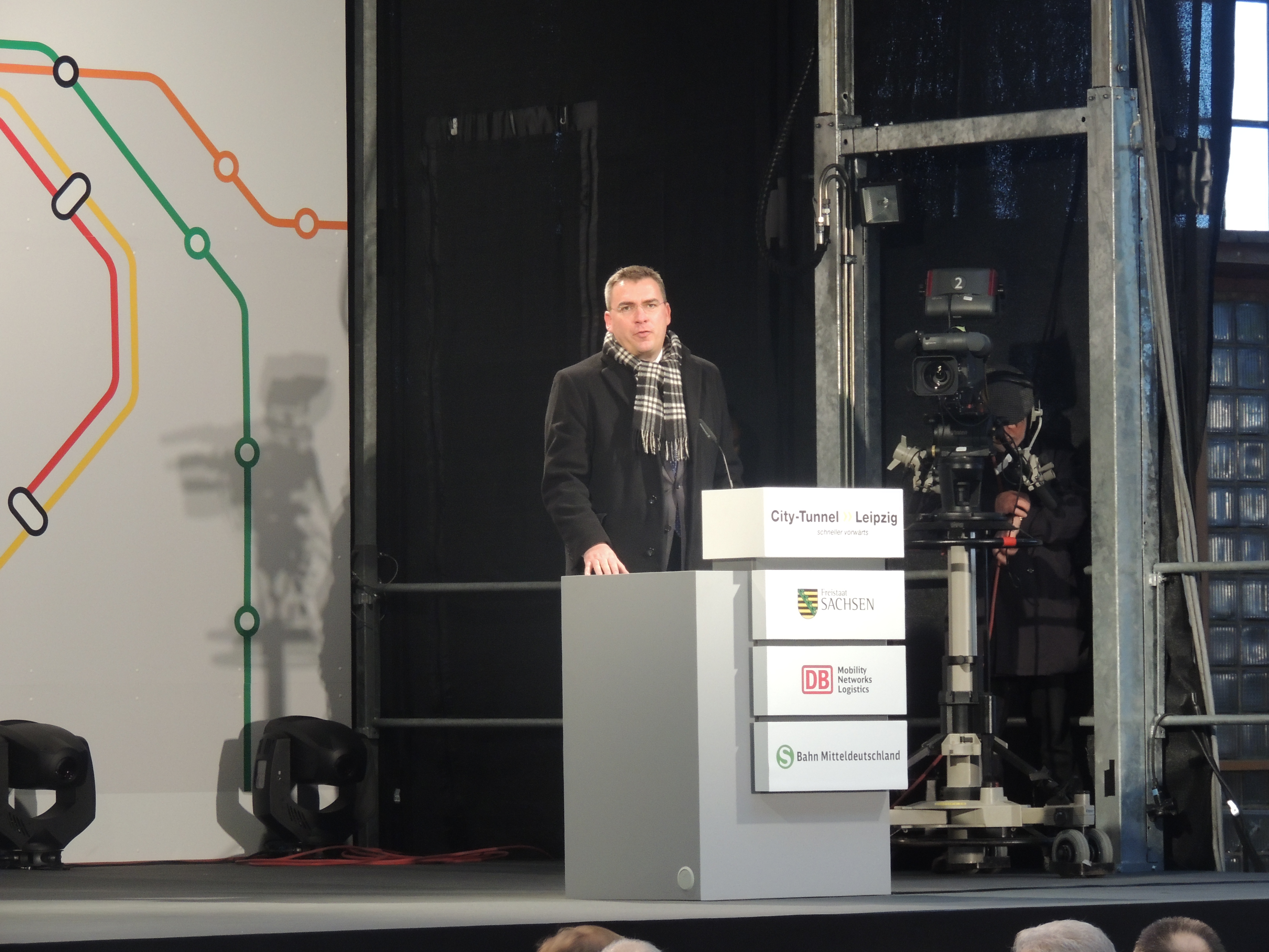 Jan Mücke (Parlamentarischer Staatssekretär beim Bundesminister für Verkehr, Bau und Stadtentwicklung) zur Eröffnungsveranstaltung des City-Tunnels im Leipziger Hauptbahnhof.